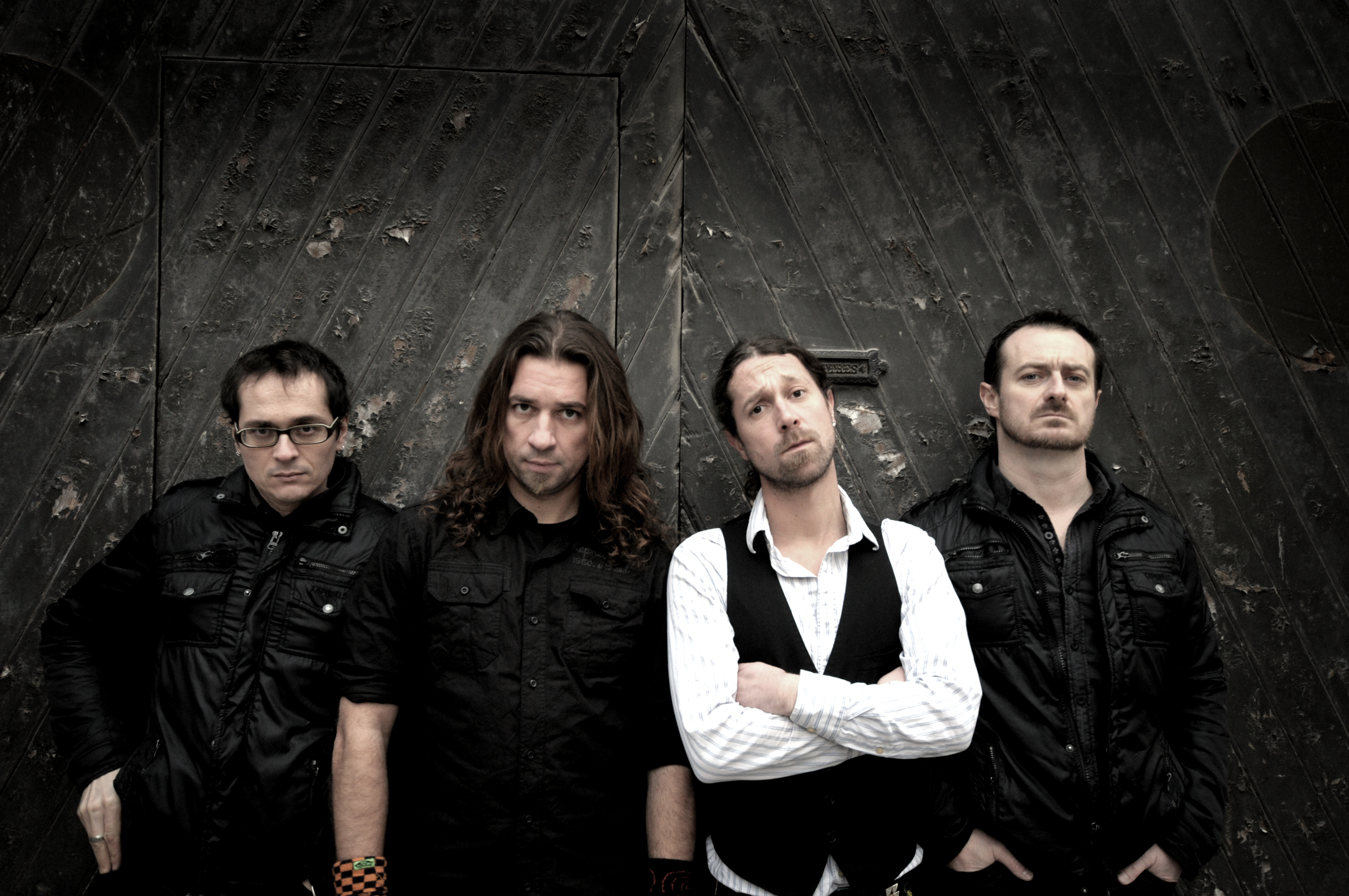 Les Fatals Picards : la formation depuis janvier 2007